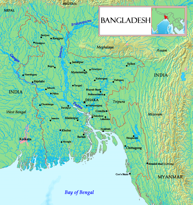 A map of Bangladesh